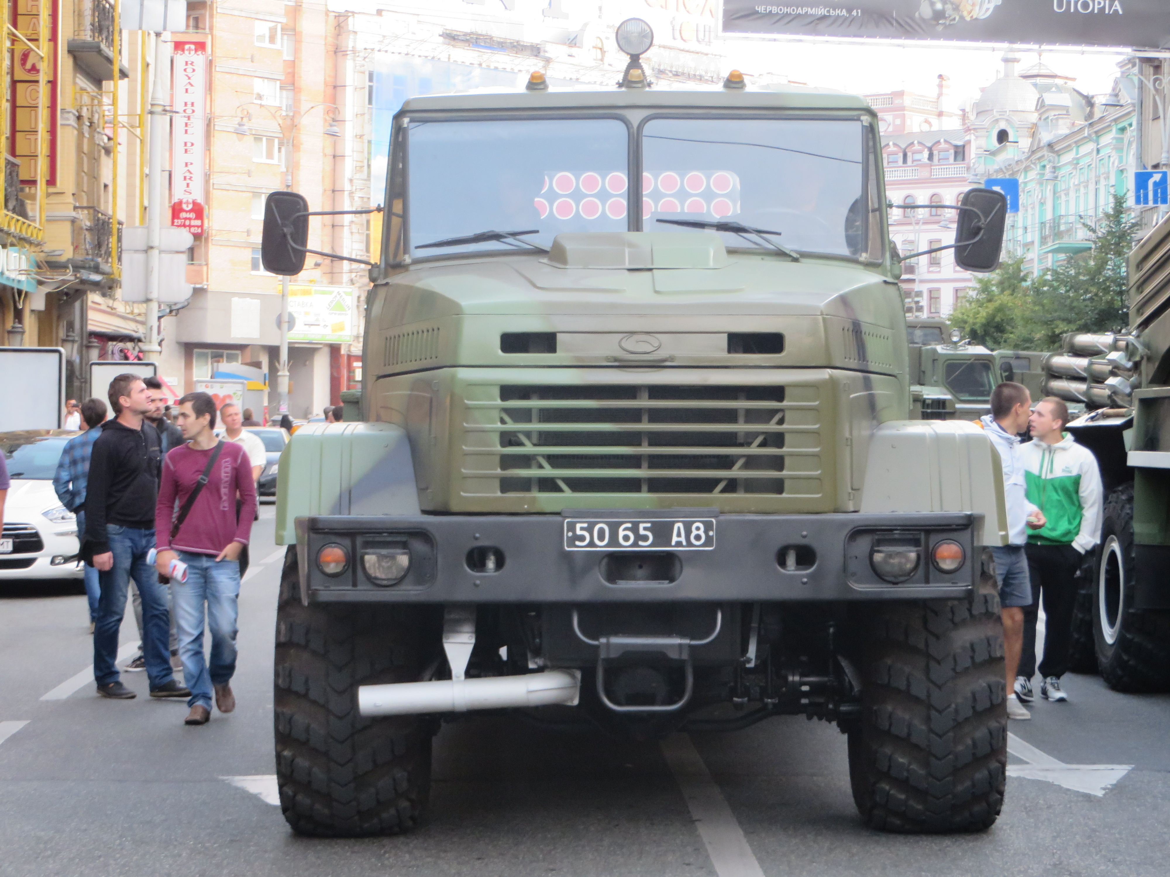 Українські системи залпового ракетного вогню Бастіон-02 під час тренувального маршу перед парадом на День незалежності, 22 серпня 2014 року, Київ, Україна.